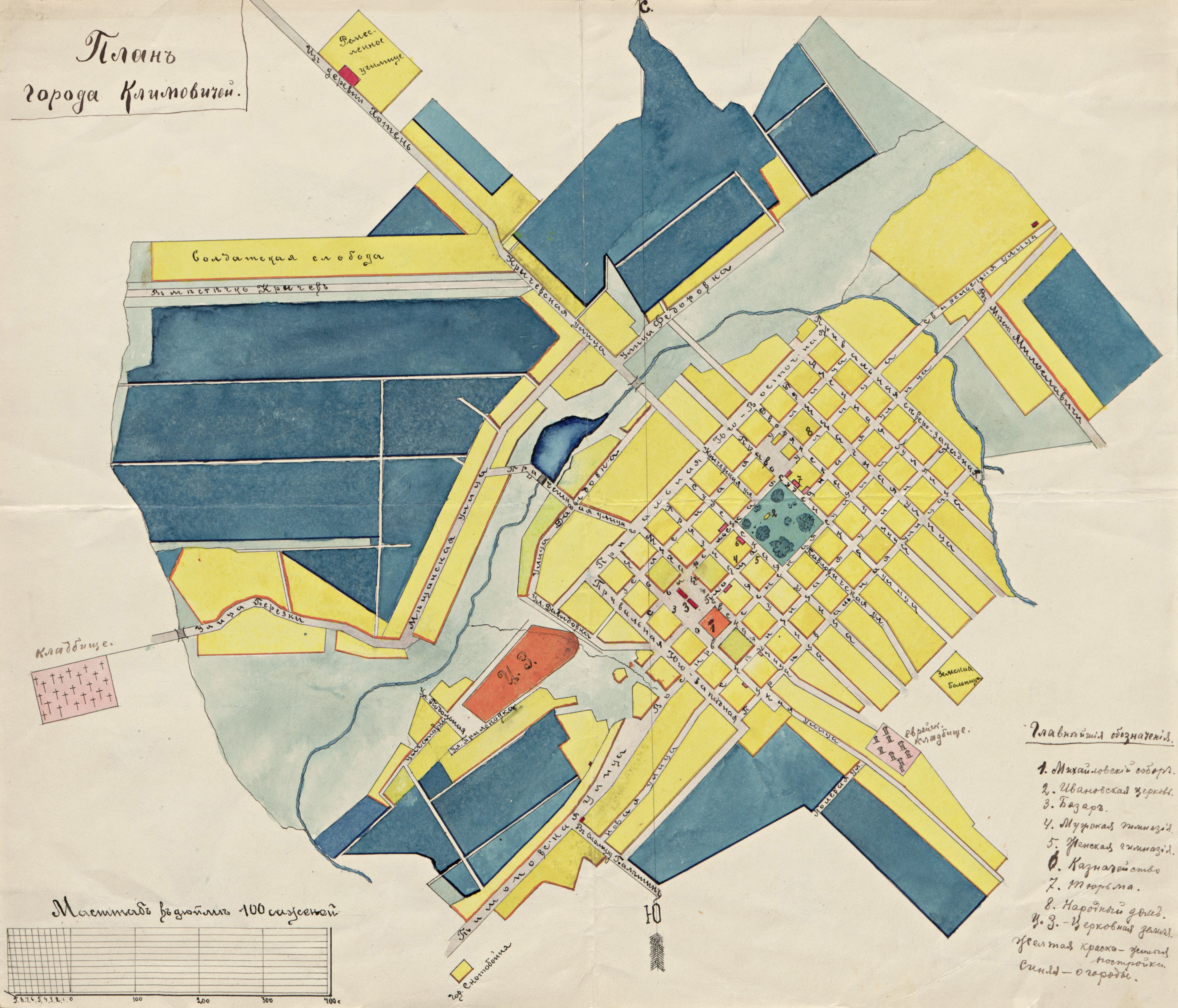 Беларуская (тарашкевіца): Клімавічы (Klimavičy). Плян места